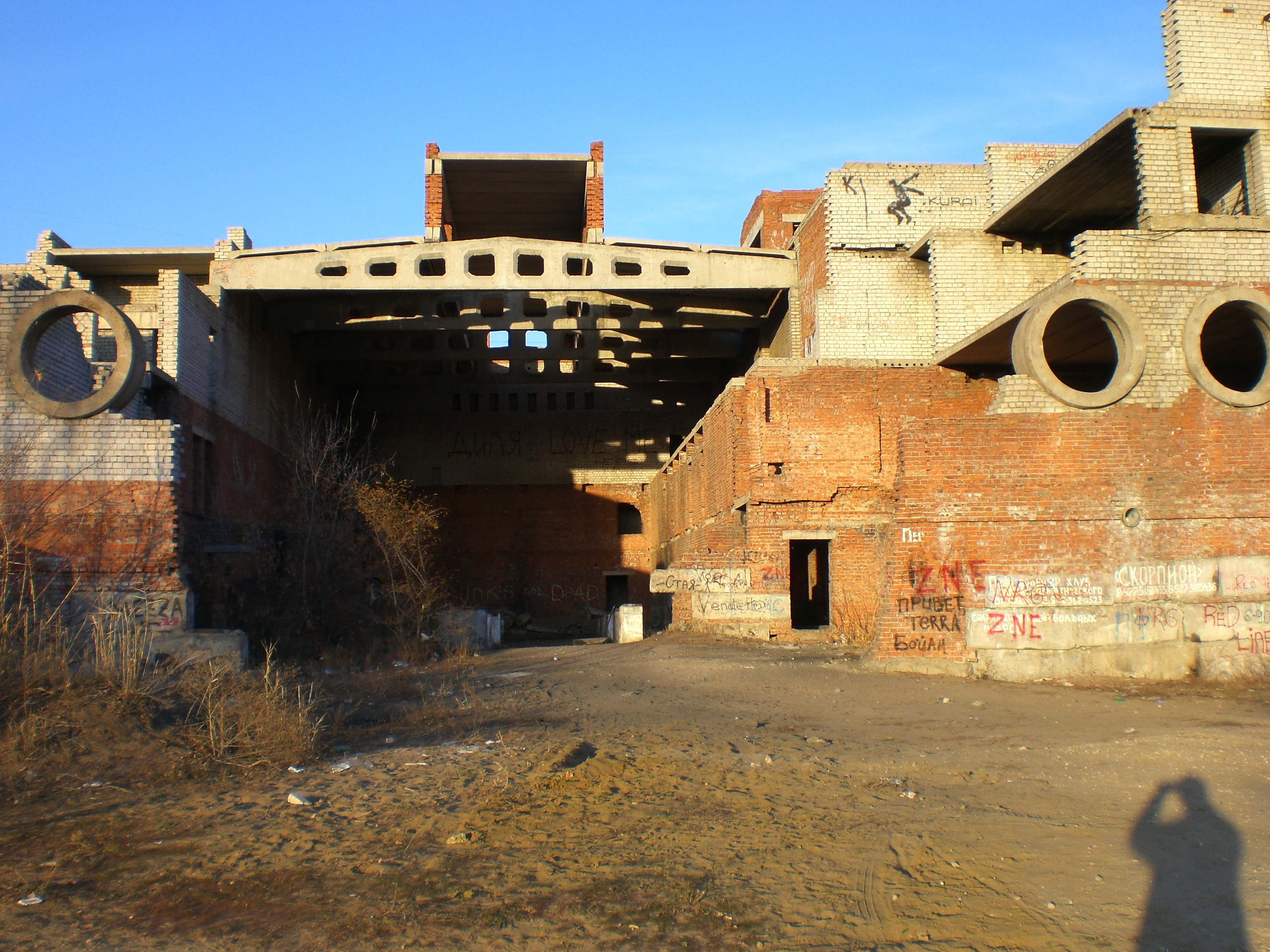 Комплекс по обучению детей плаванию. Волгоград.